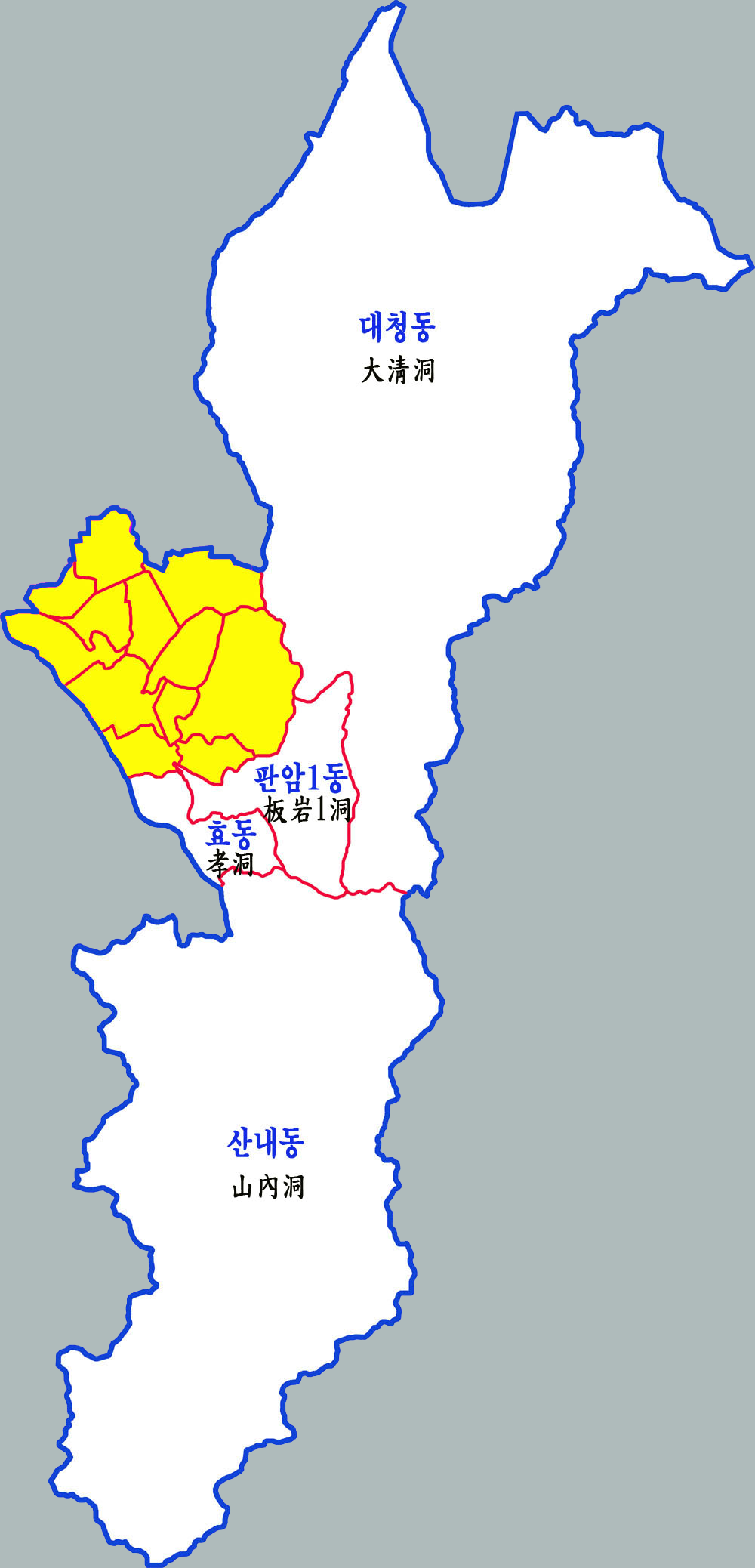 대전시 동구 행정구역